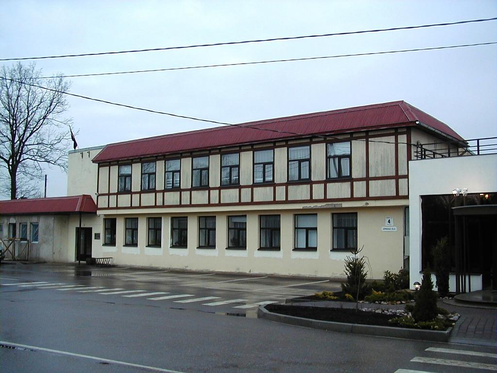 Inčukalna pagastnams 2000-12-10